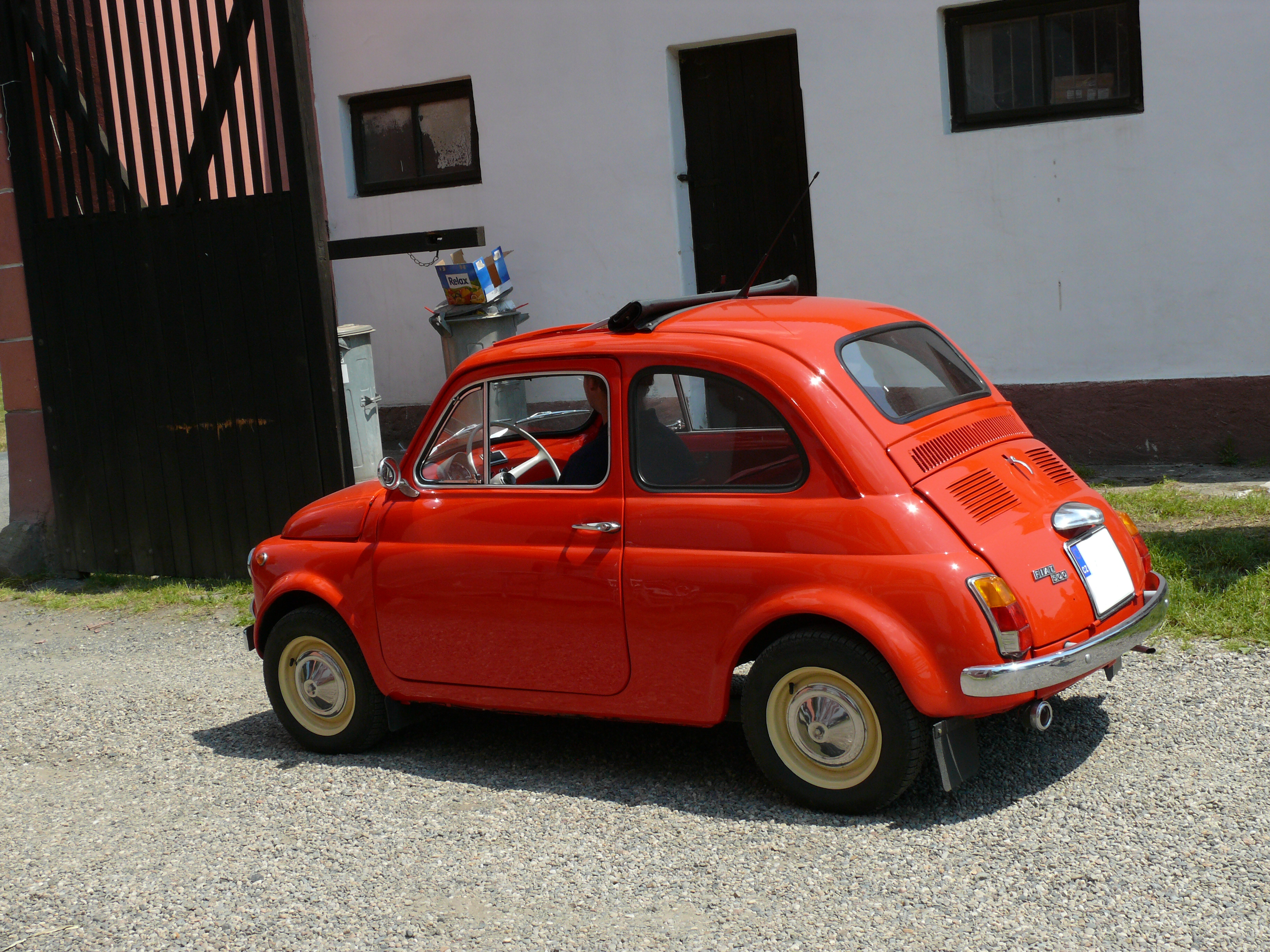 Fiat 500, Veteránské rojení Lešno, 10. 7. 2007